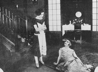 Cena do filme "Quuando elas querem" (1925), de E.C. Kerrigan - Acervo Cinemateca Brasileira